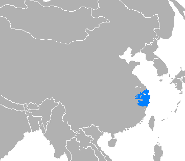 Idioma wu